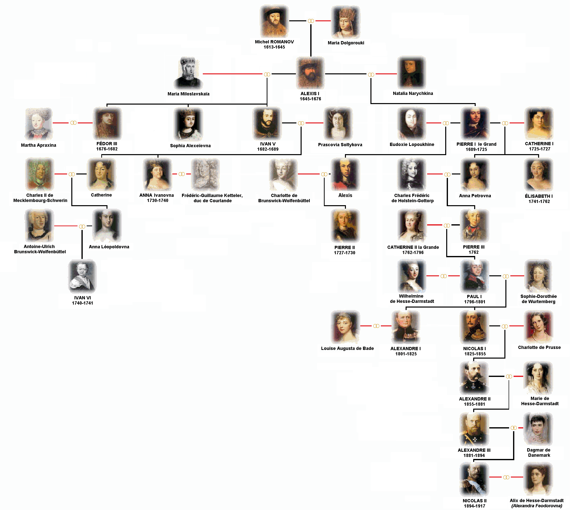 Chronographie de la Maison Romanov